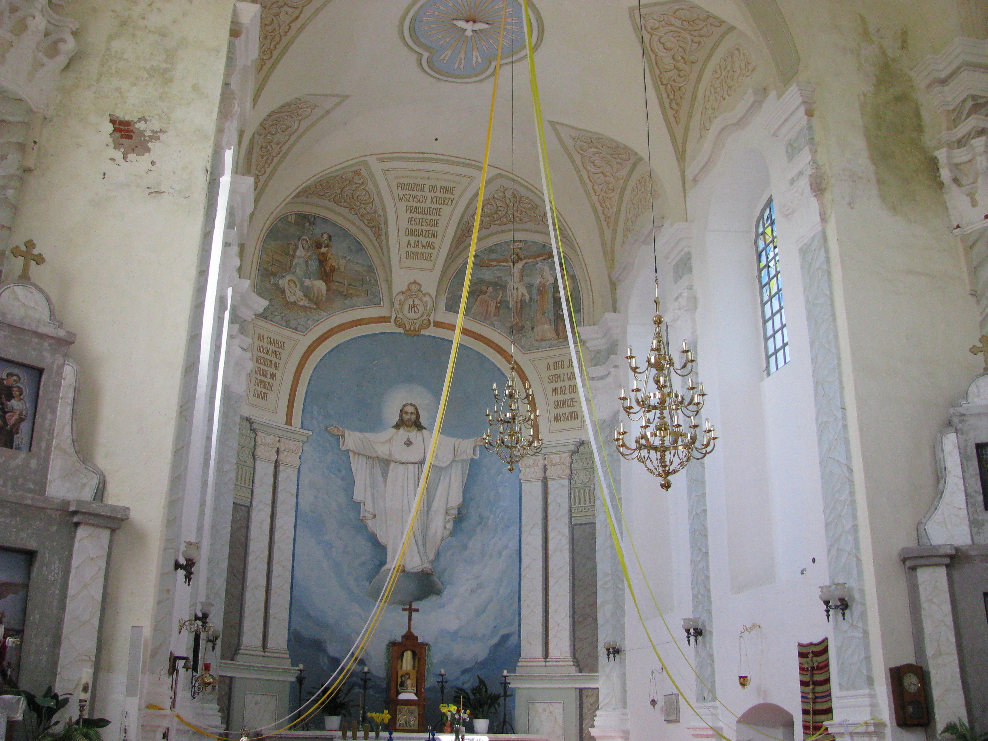 Беларуская (тарашкевіца): Міхайлаўскі касьцёл. в. Лужкі This is a photo of Belarusian heritage monument. Reference number: 212Г000839 ( WLM)